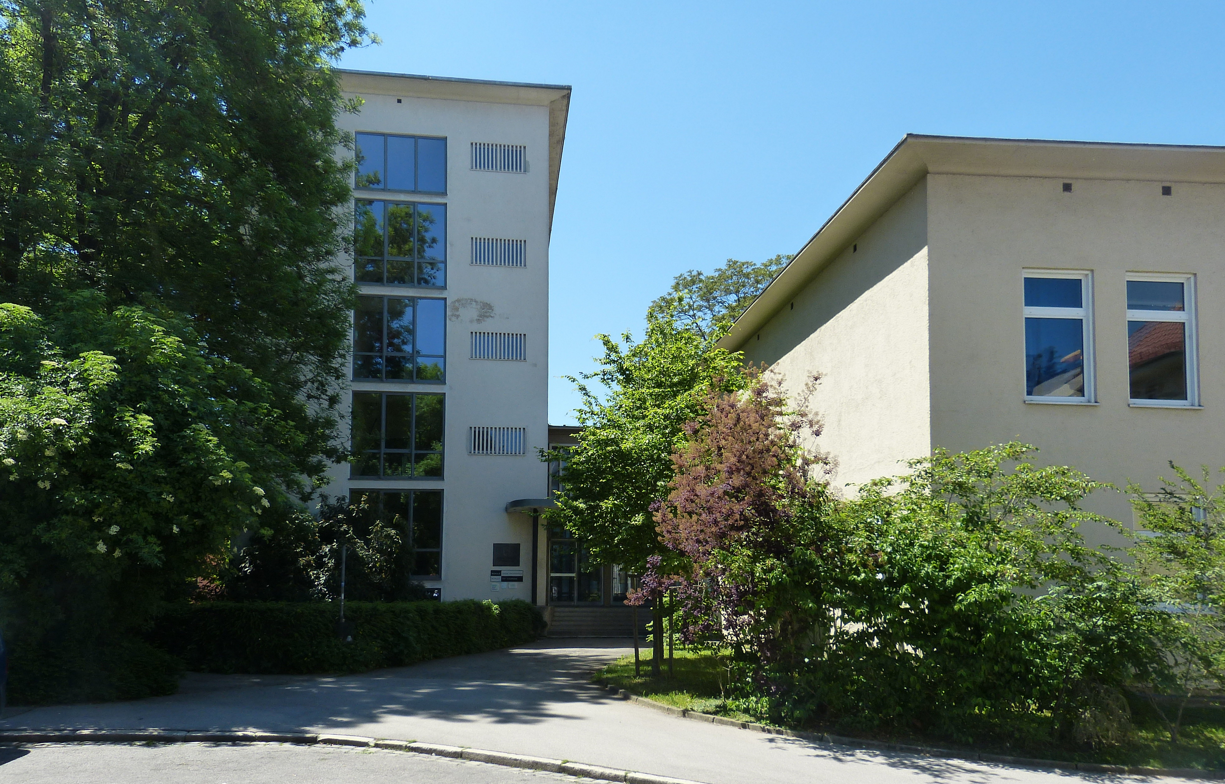 Jakob-Fugger-Gymnasium Augsburg. Eingang zum Verwaltungs- und Klassentrakt